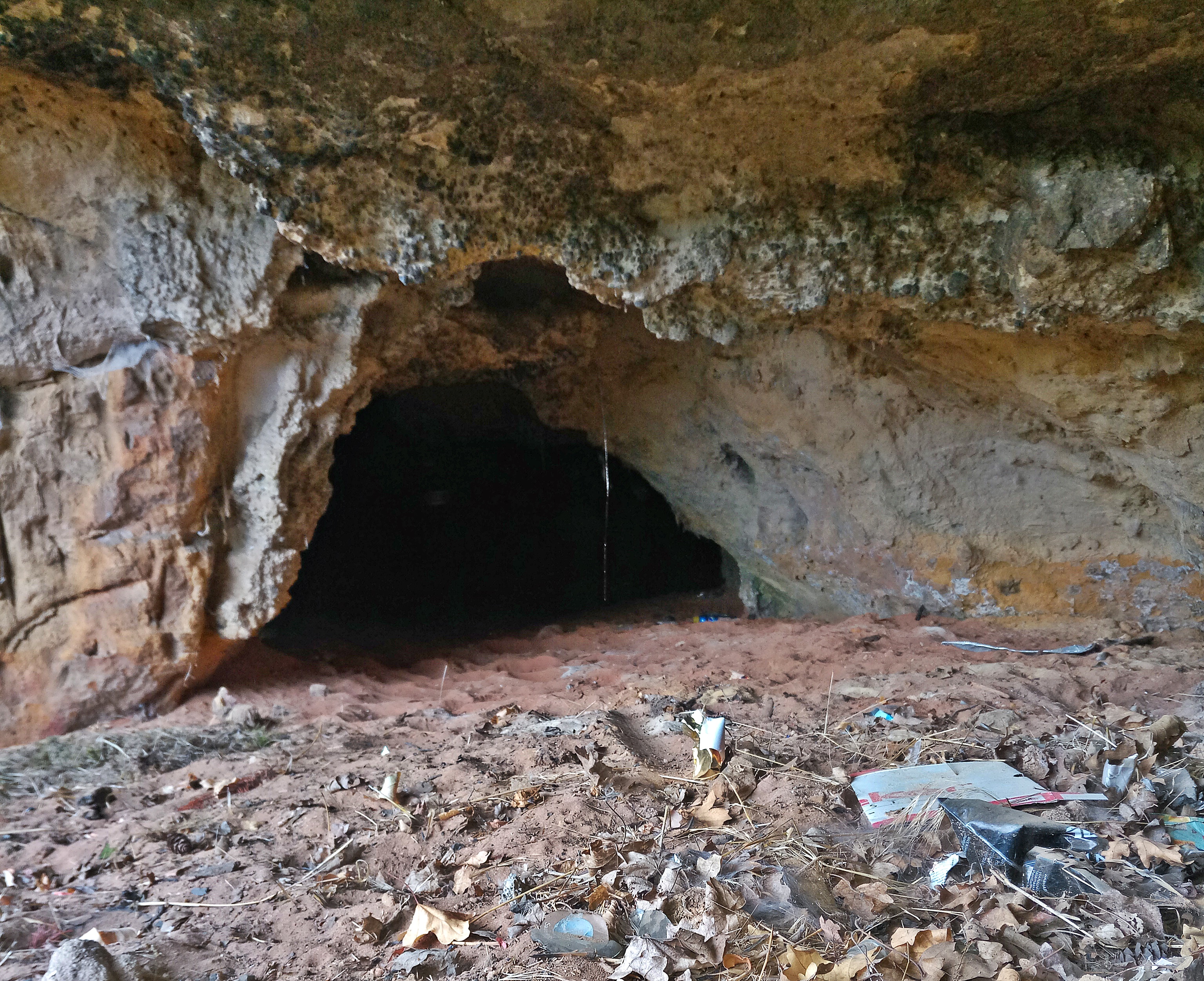 Sausenheim Fuchshöhle